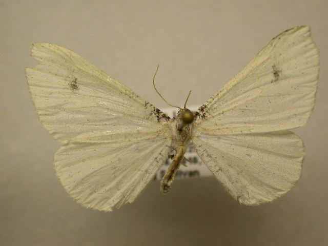 Macrosoma albida